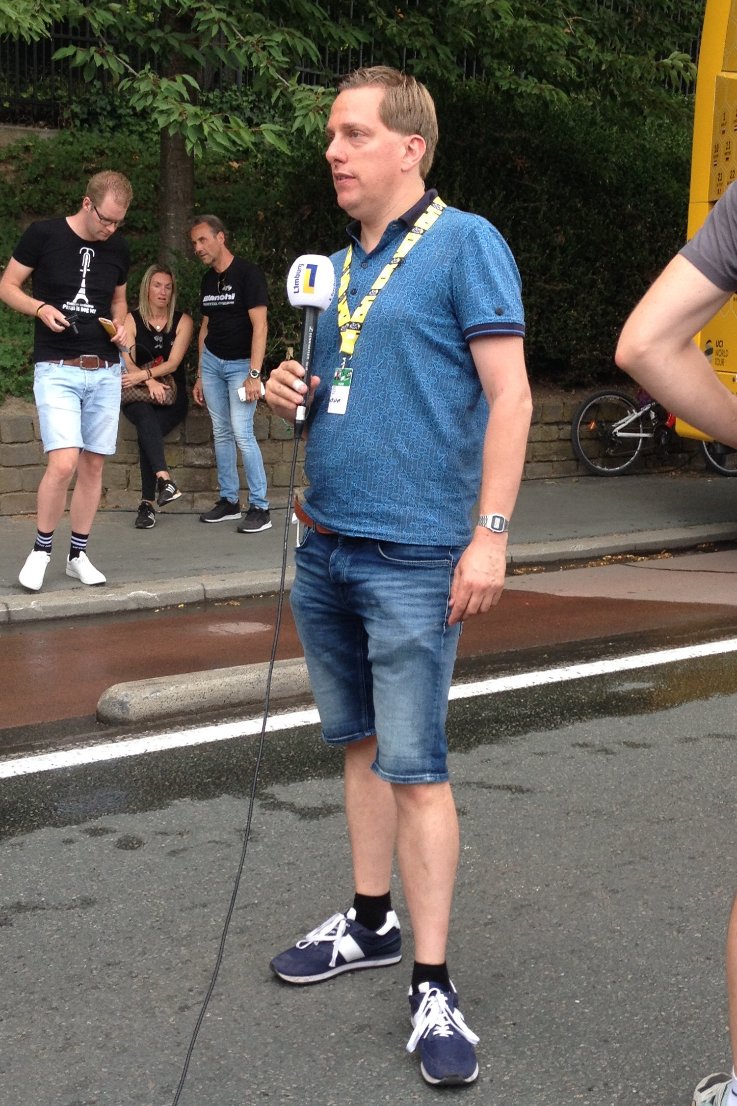 Grand Départ van de Tour de France in Brussel, finish in Laken op zaterdag 6 juli 2019